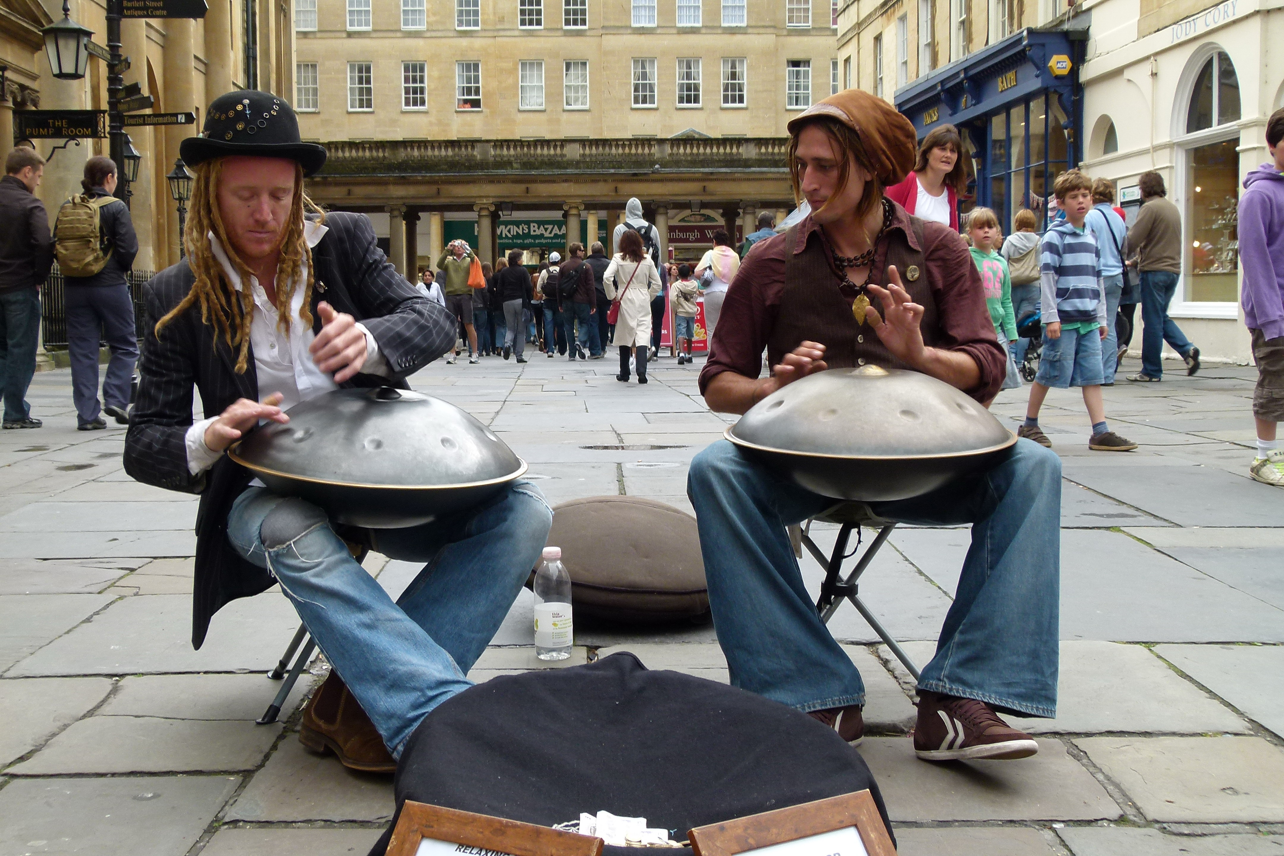 Musiker mit Hangs in Bath, Großbritannien. Das Hang (Musikinstrument) wurde 2000 in Bern von Felix Rohner und Sabine Schärer erfunden und bedeutet "Hand" in der Berner Mundart. Es besteht aus gasnitriertem Stahlblech und kann mit der Hand oder mit den Fingern geschlagen werden.